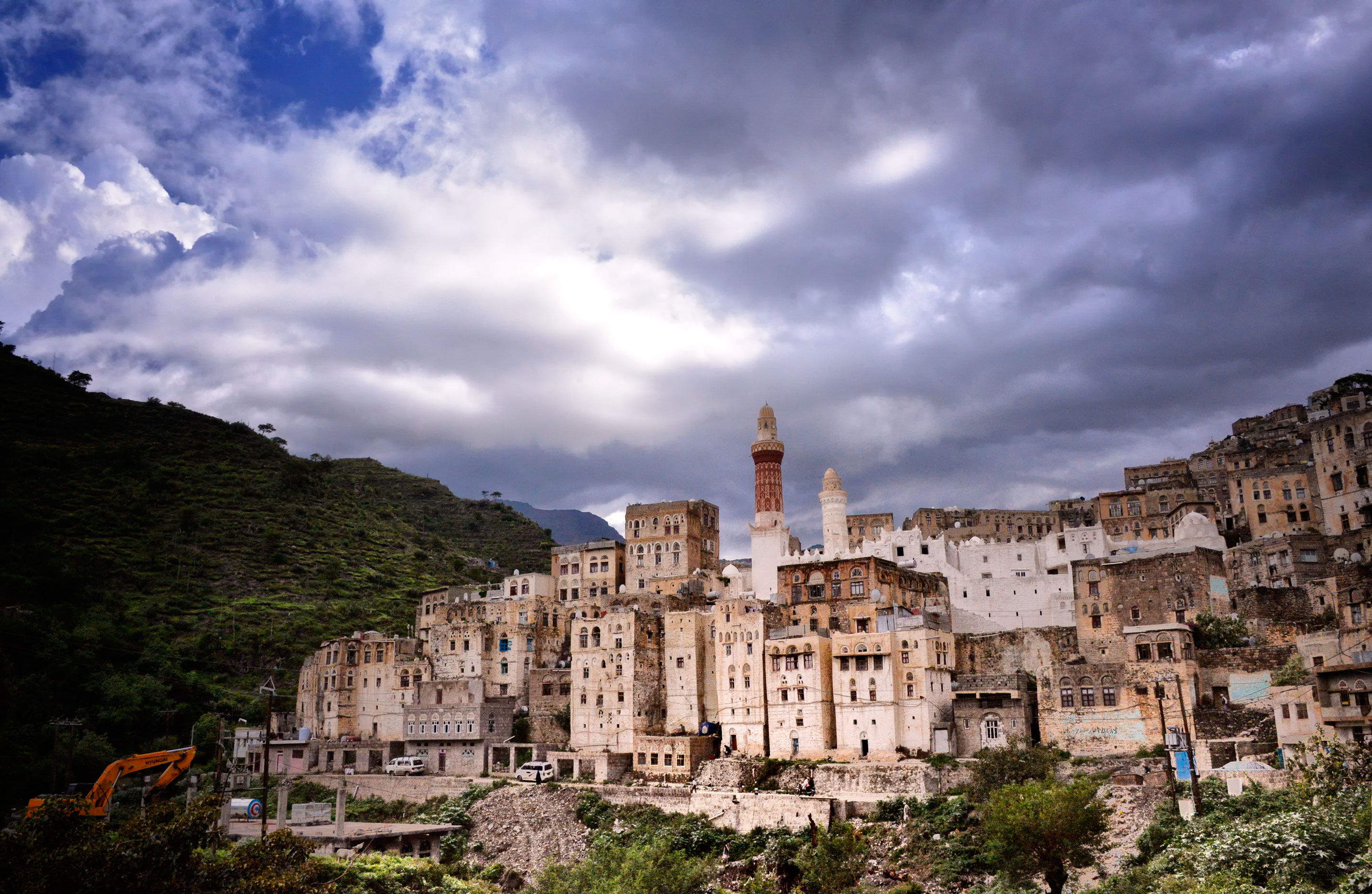 Jibla, Yemen